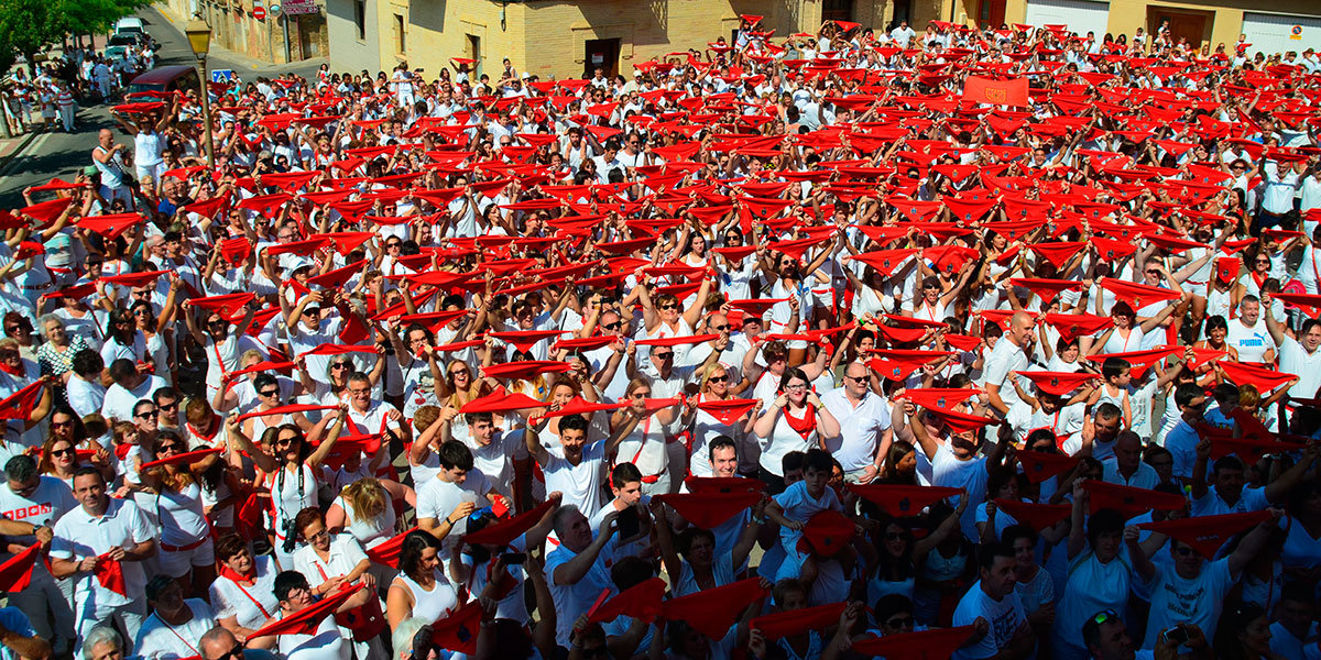 Imagen del chupinazo de fiestas de Murchante